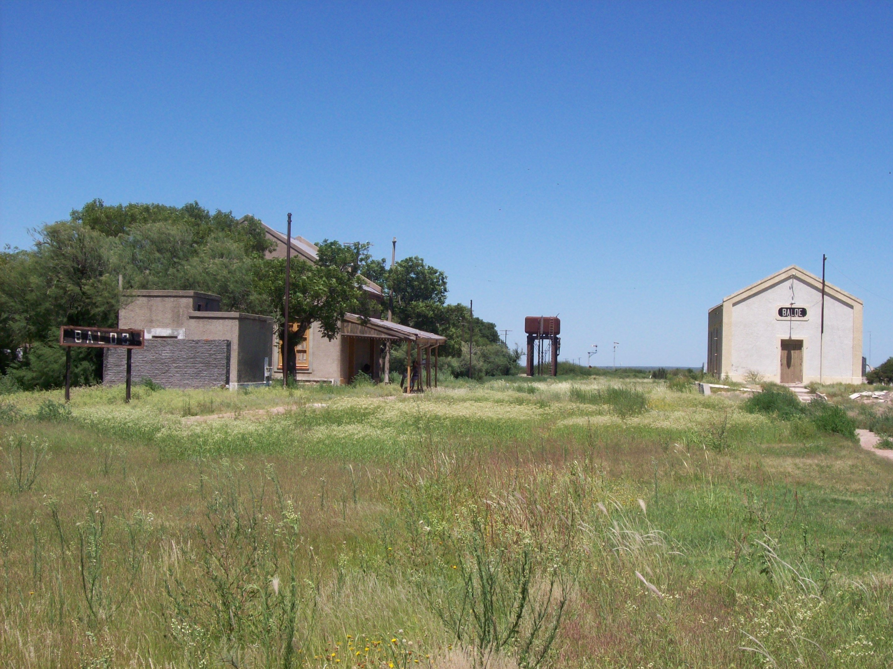 Estación de ferrocarril Balde, en la Provincia de San Luis, Argentina, actualmente clausurada.